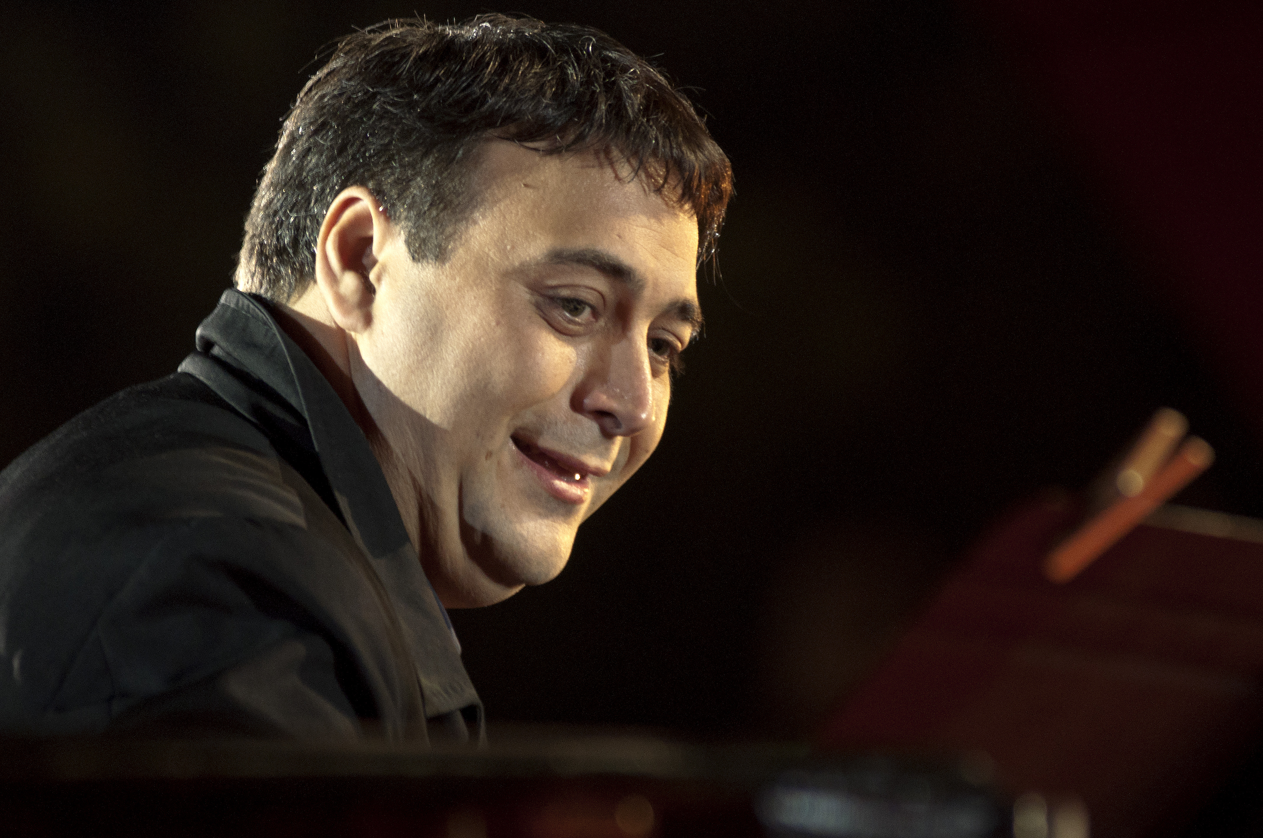 Portrait du pianiste Eric Legnini en concert en trio le 2011-09-30 au cours de l'enregistrement des "Victoires du Jazz" pour France3, à Nice